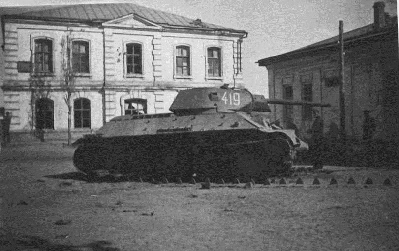 Площадь у Введенской церкви в Белой Калитве в период нацистской оккуппации